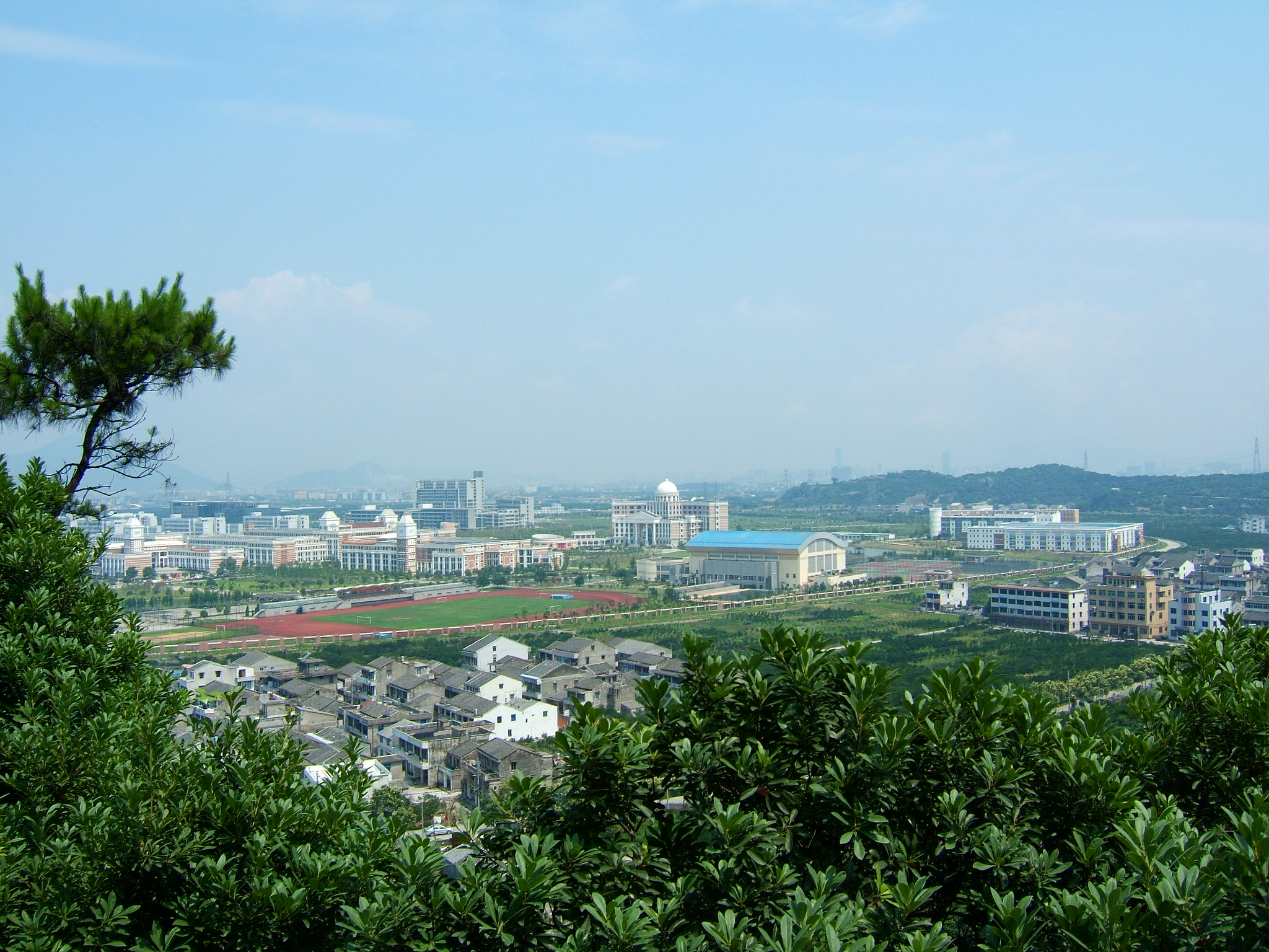 远眺大学城